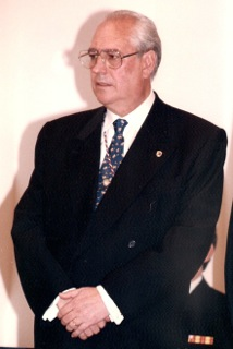 Fotografía realizada durante la vista de los Reyes el 25 de Marzo 1998